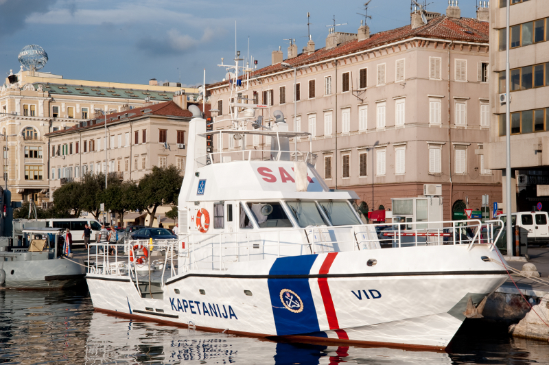 Kapetanija u riječkoj luci